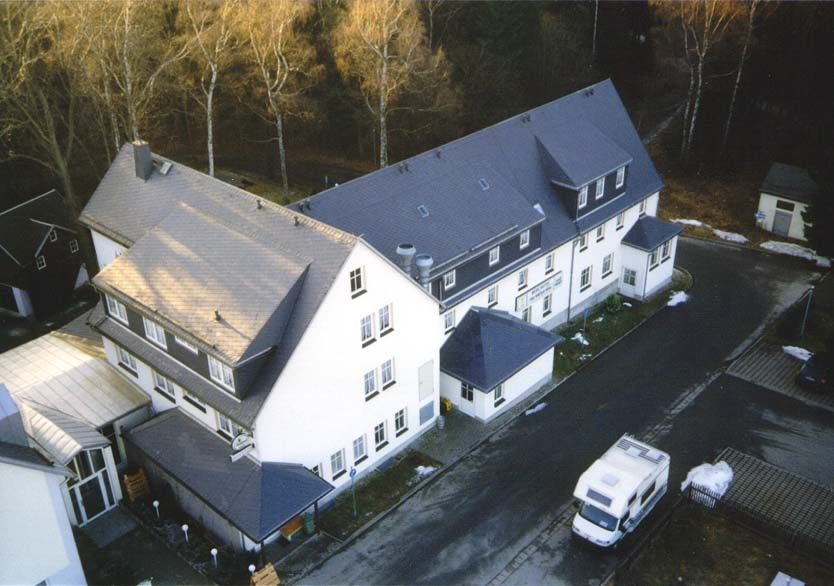 Blick vom Aussichtsturm auf das Berghotel Drei Brüder Höhe